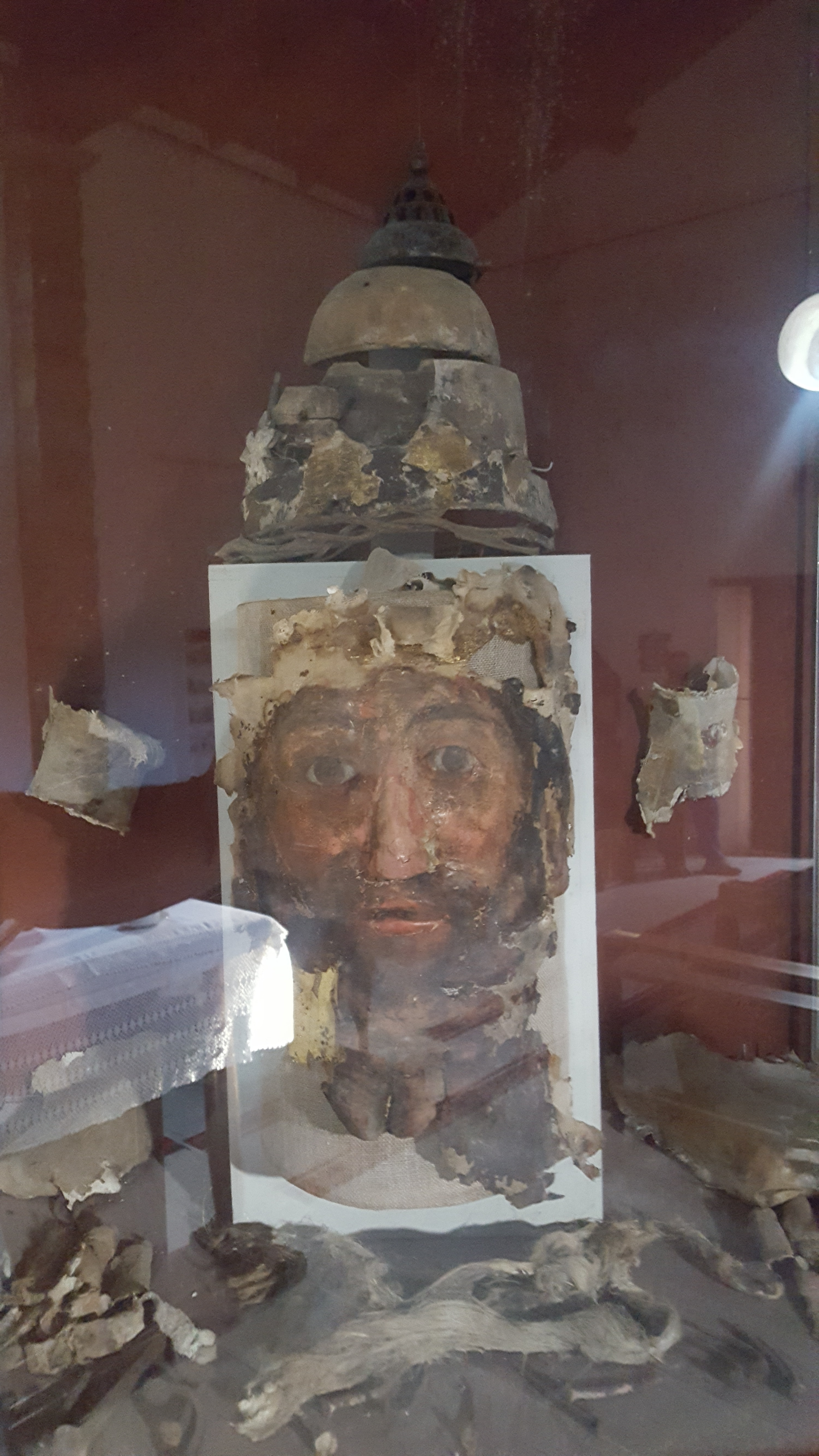 Particolare di alcuni pezzi recuperati dal restauro